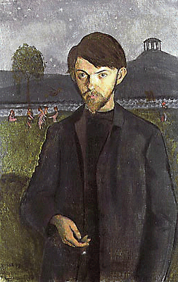 Self-portrait